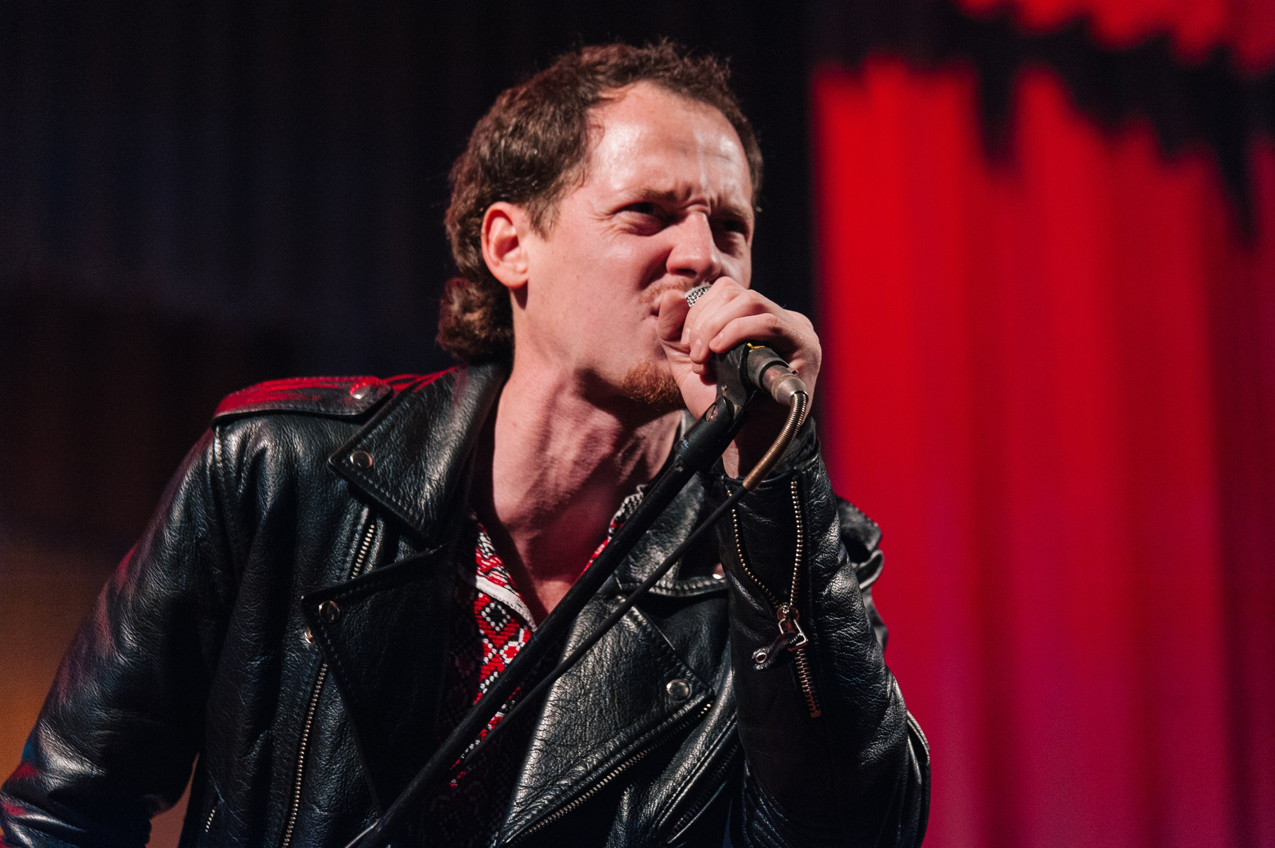 Сергій Василюк. Концерт "Тінь Сонця" у Мелітополі 12 жовтня 2016 року